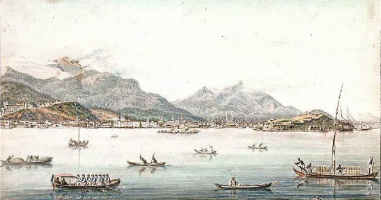 Михайлов Павел Николаевич - Вид города Сан-Себастьян в Рио-де-Жанейро